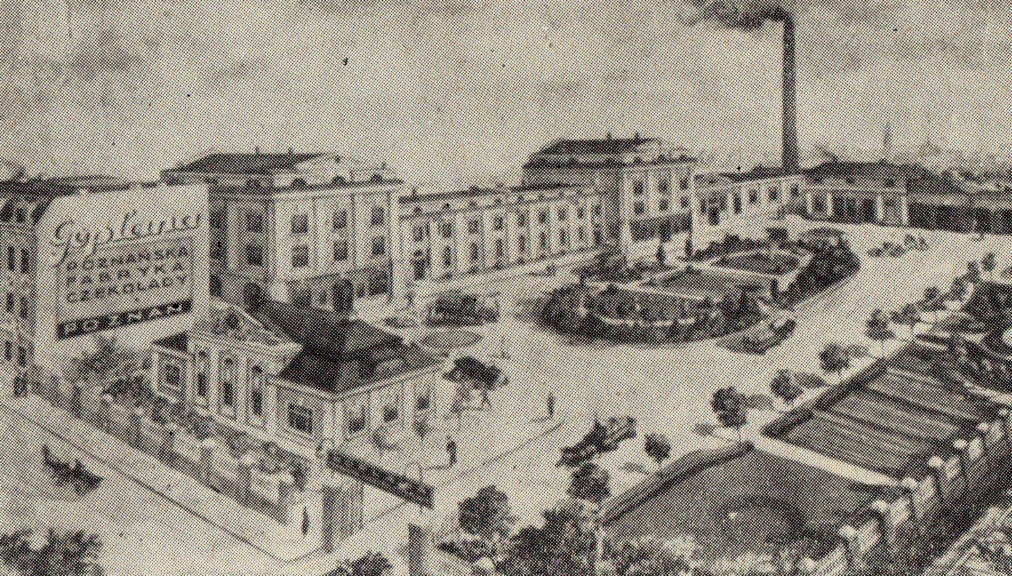 Zakłady cukiernicze Goplana w Poznaniu.